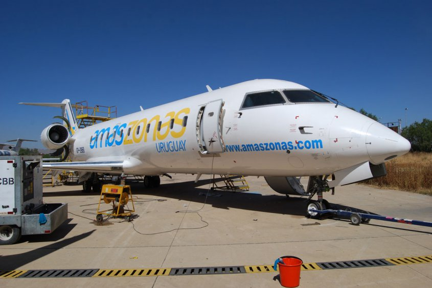 Bombardier CRJ200 de Amaszonas Uruguay en Carrasco.